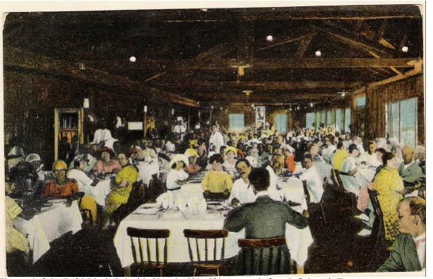 Restaurante do hotel "Balneário Picoral" em Torres, anos 30